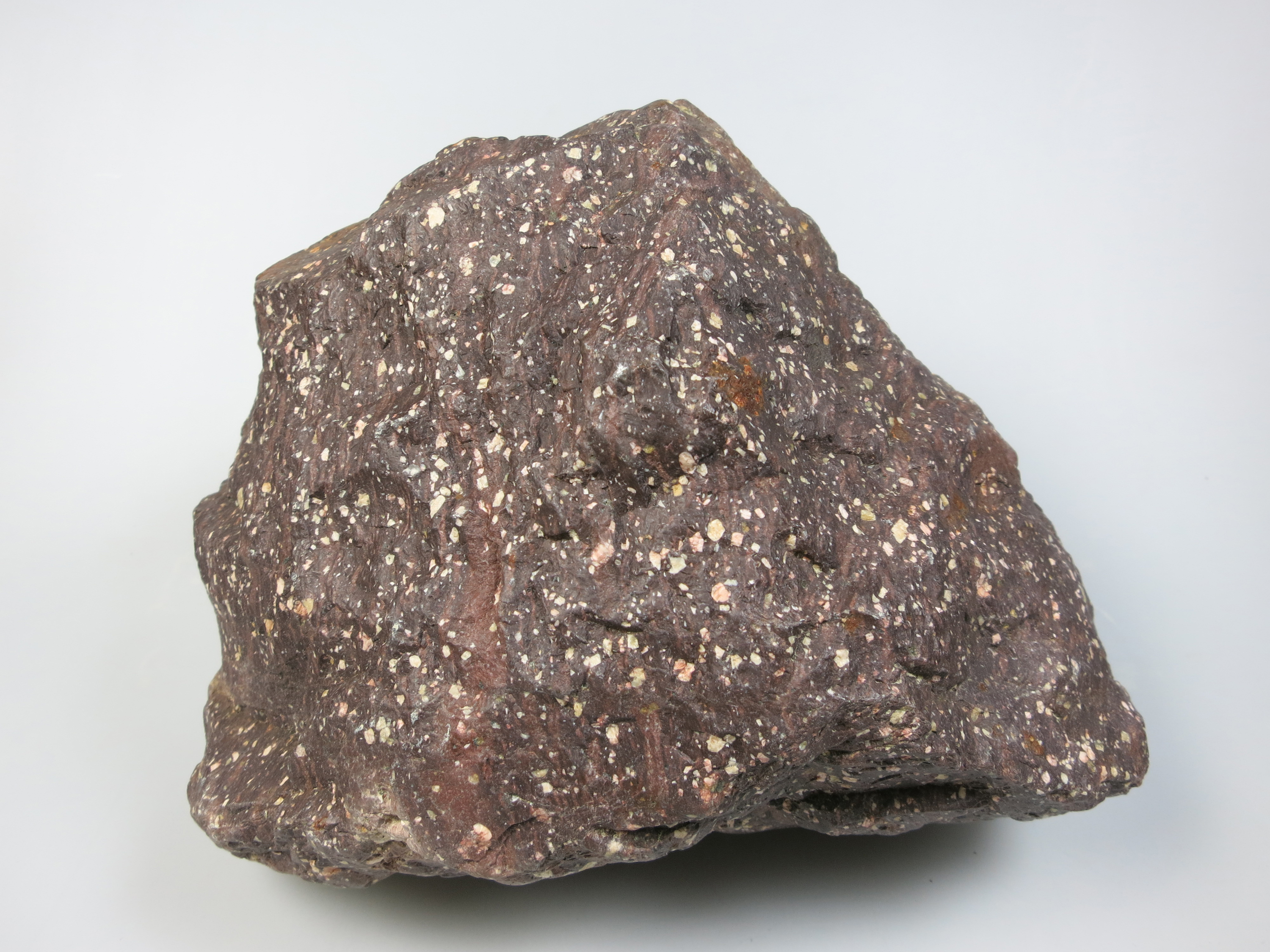 Älvdalen-Ignimbrit ; Herkunft: Dalarne Alter: Präkambrium; Fundort: Kiesgrube Wriezen